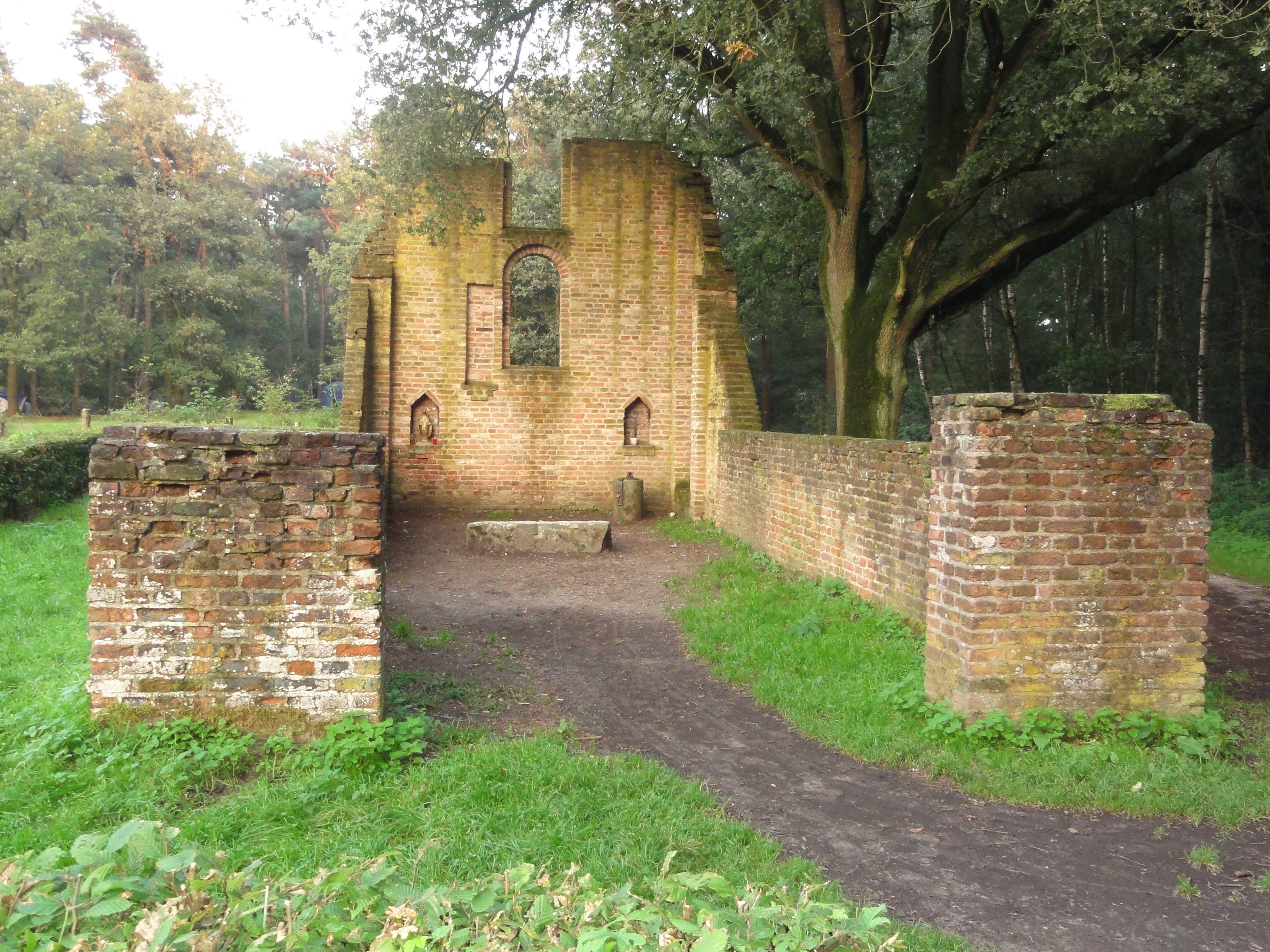 (Overasselt (Heumen) Rijksmonument 32124 Ruïne St.Walrickkapel